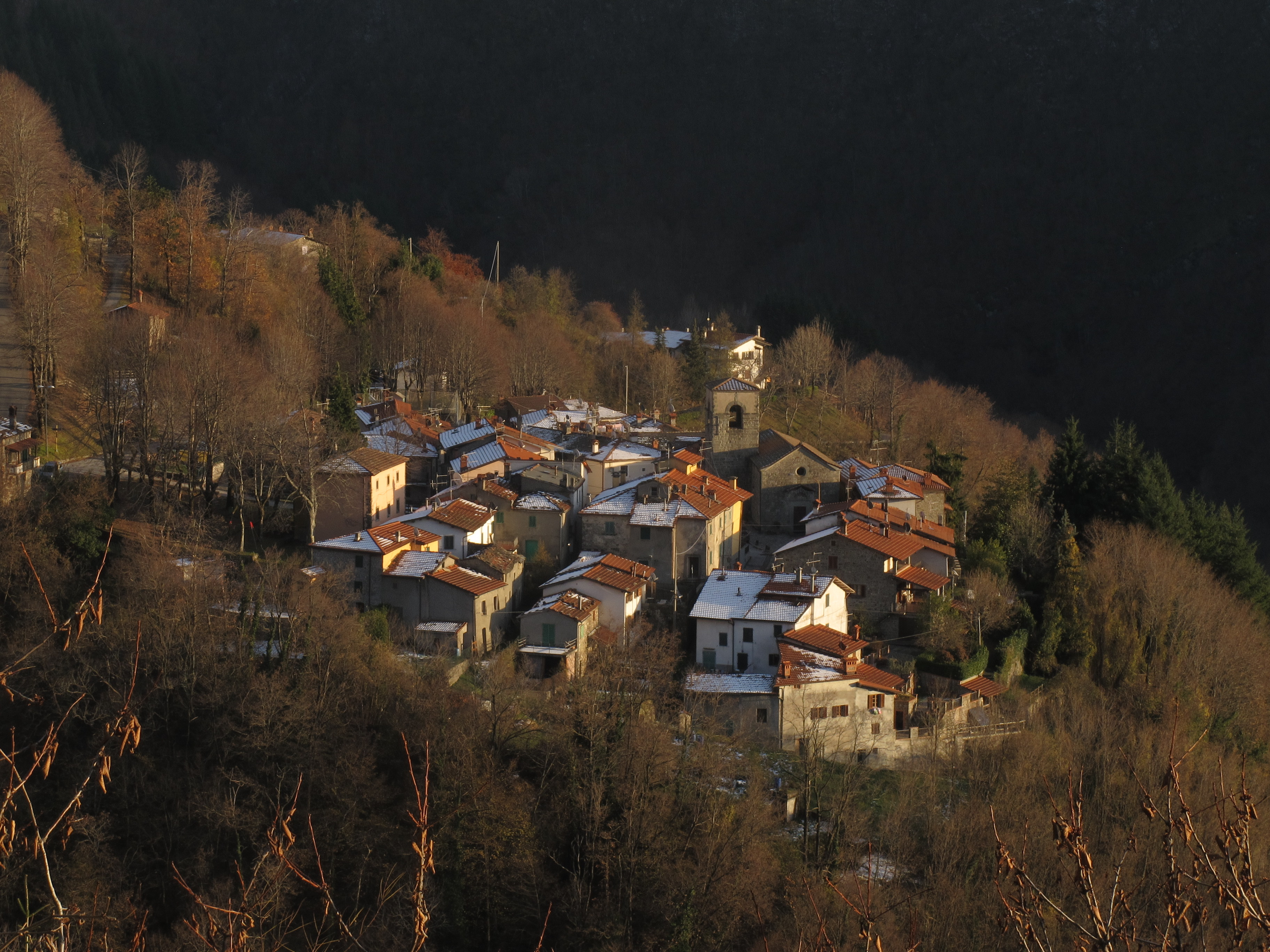 Panorama di Spignana in Autunno-Inverno